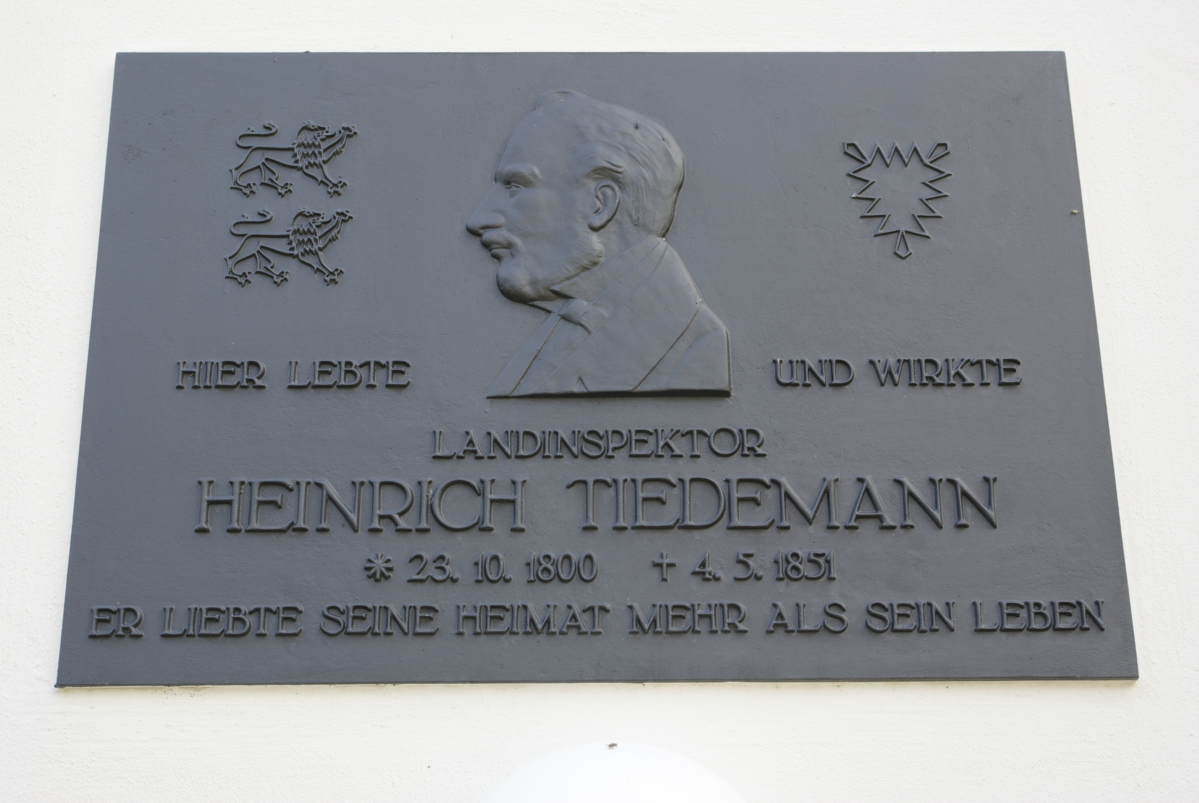 Kulturdenkmale in Meggerdorf Nummer 1 Zähler 1